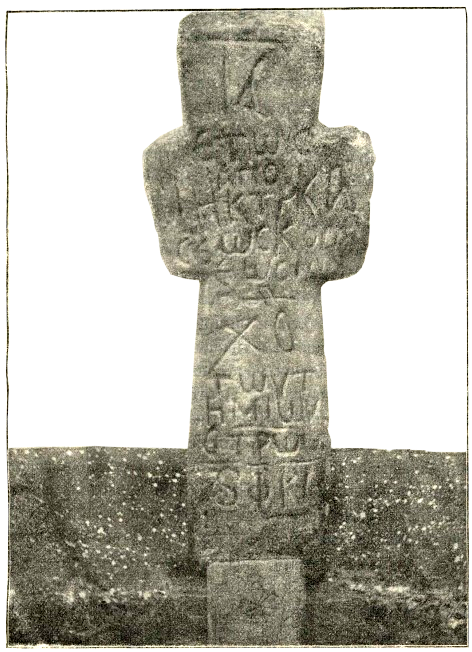 Северный Зеленчукский храм - крест с надписью «Лета от сотворения мира доныне, честного креста, 6521» (1013 год от Рождества Христова).